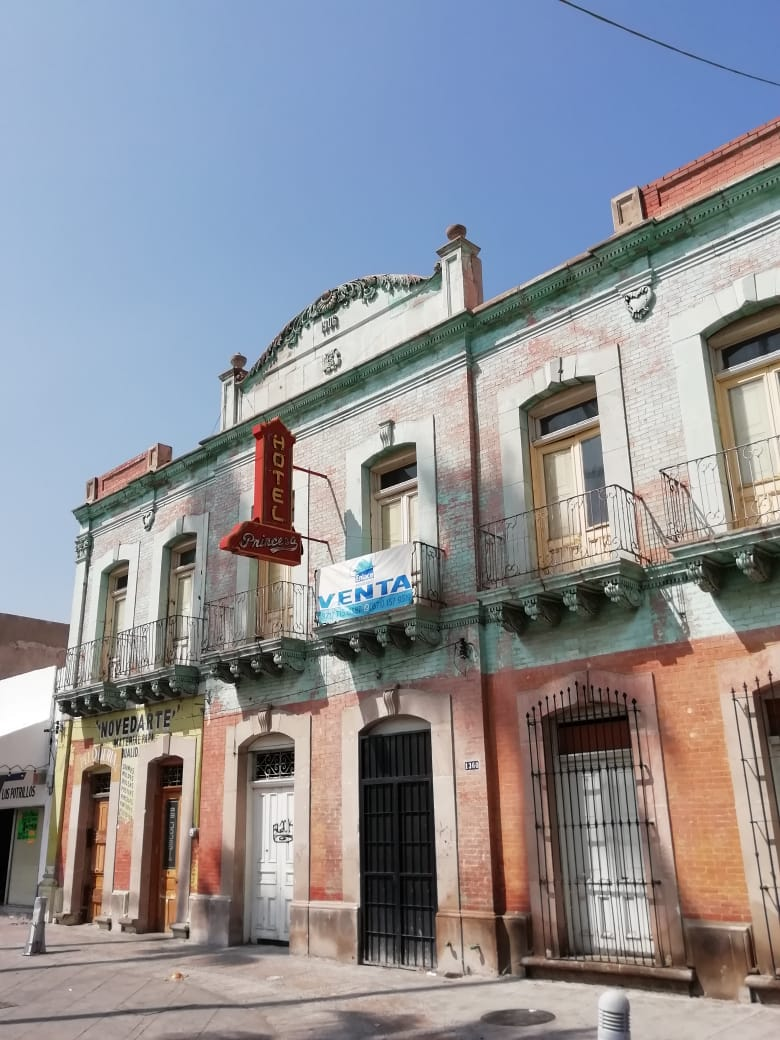 Hotel Princesa en el centro histórico de la ciudad de Torreón